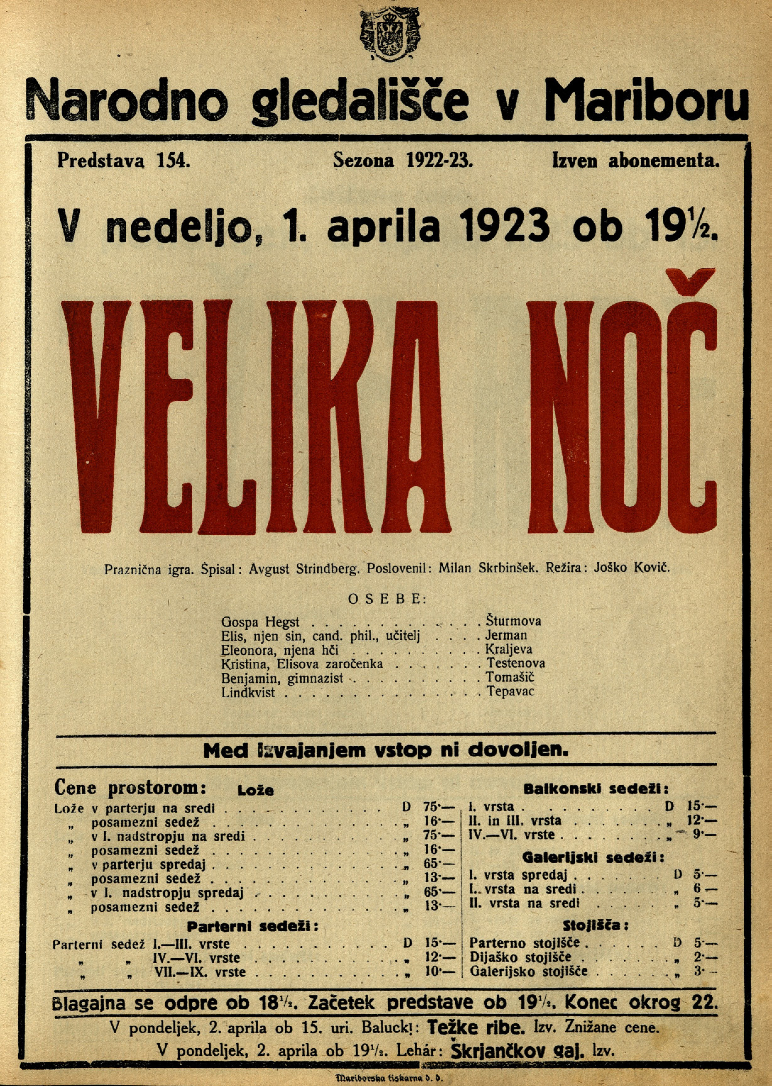 Plakat za predstavo Velika noč v Narodnem gledališču v Mariboru.